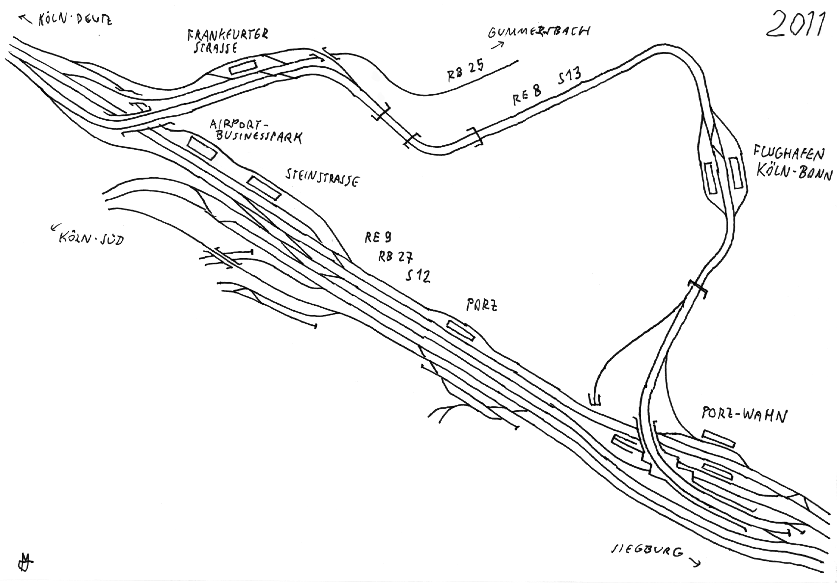 Der Plan zeigt die Gleisanlagen der Flughafenschleife Köln zum Flughafen Köln/Bonn sowie deren Einbindung in das Netz der DB.